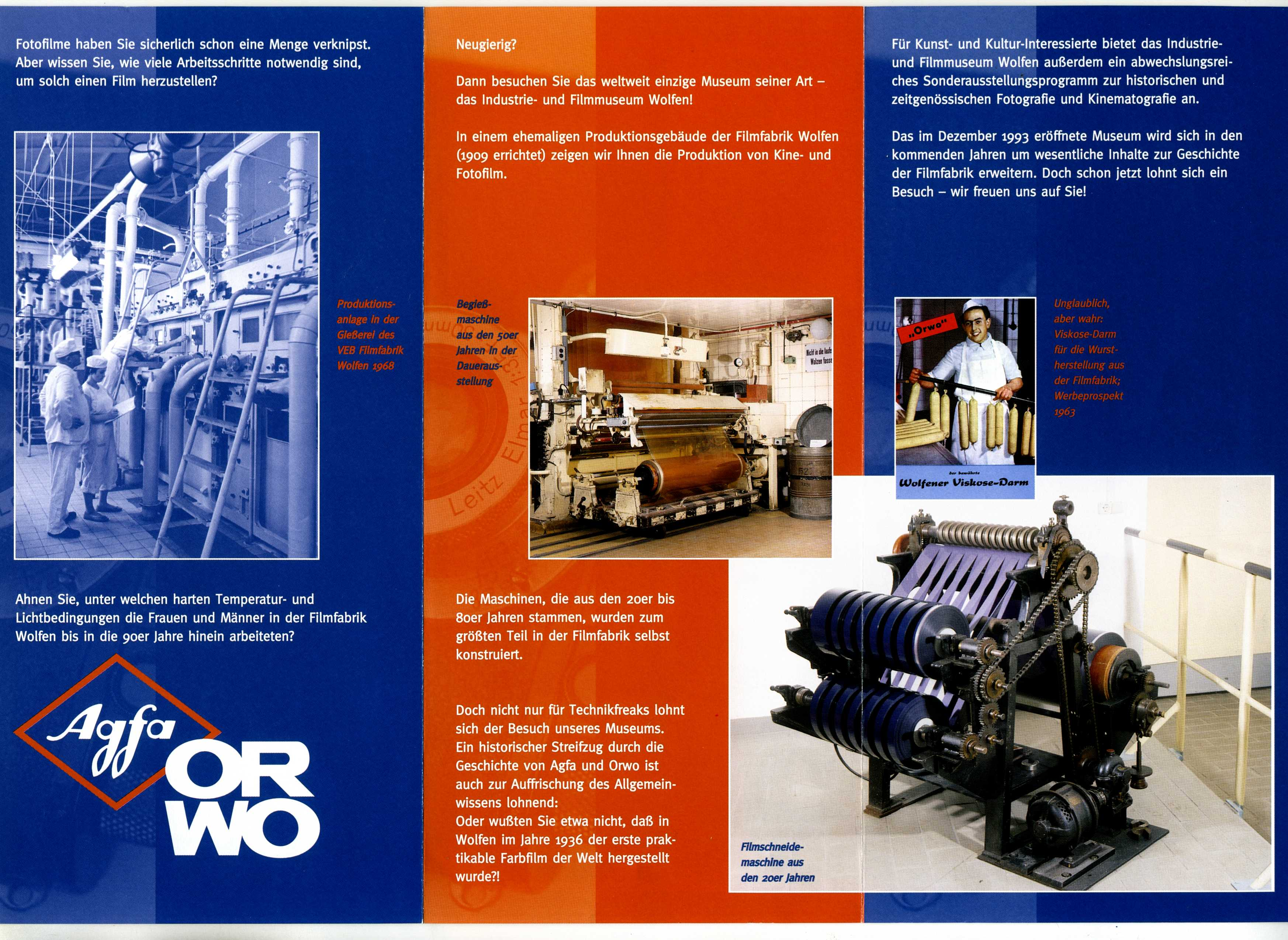 Das 1993 gegründete Industrie- und Filmmuseum Wolfen